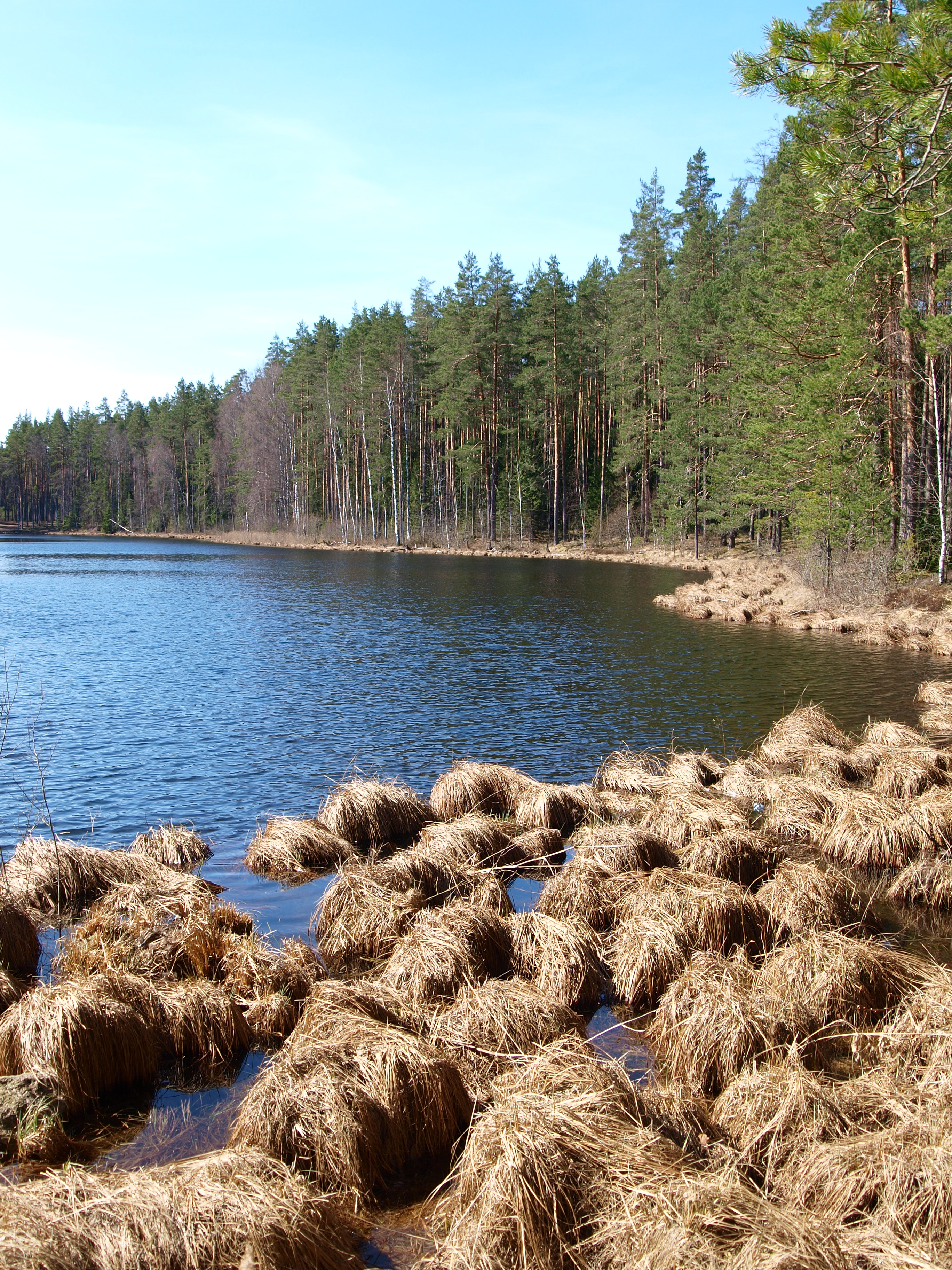 Pildil Nohipalu Valgjärv Veriora vallas Põlvamaal.